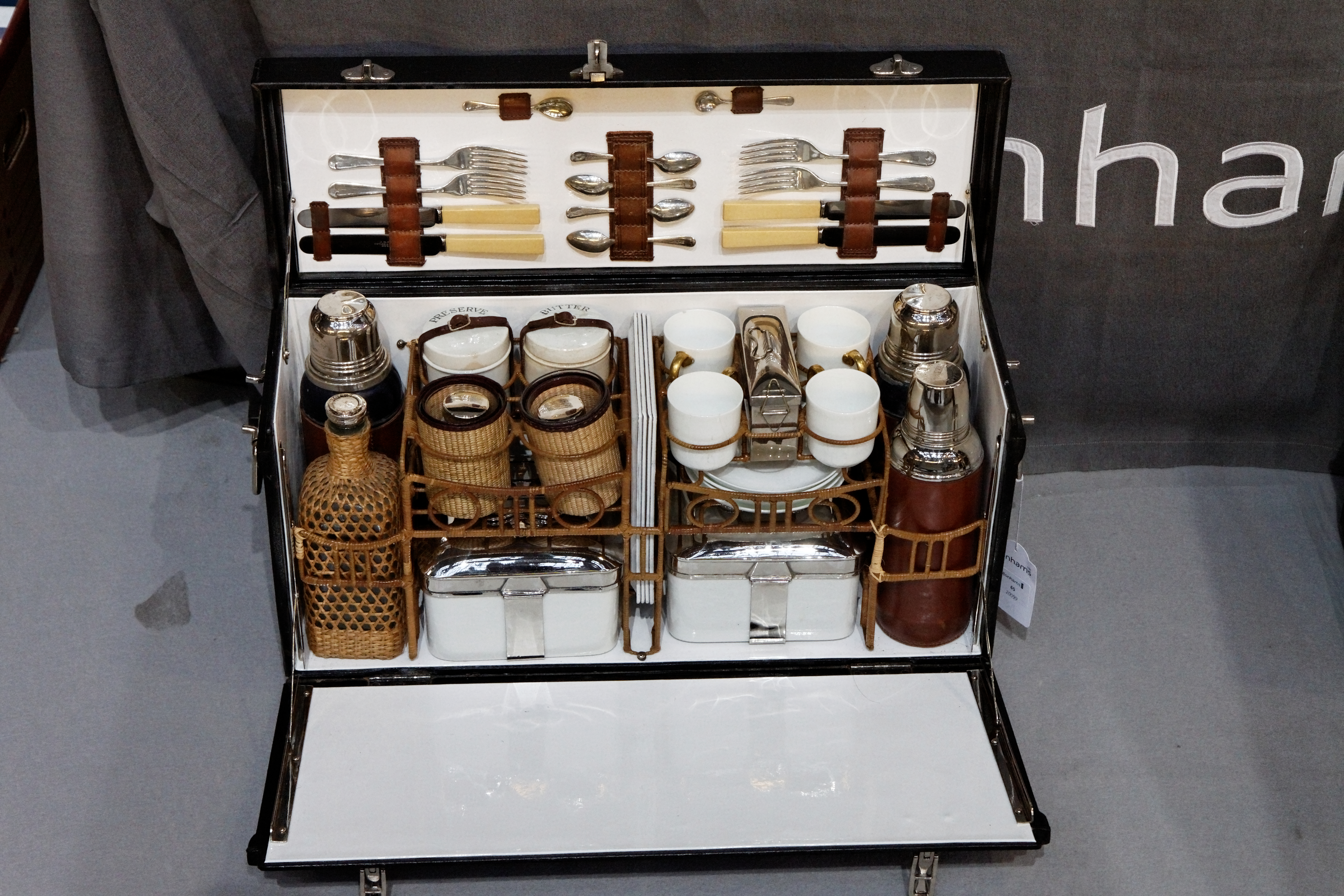 Panier à pique-nique pour quatre personnes par G W Scott & Sons